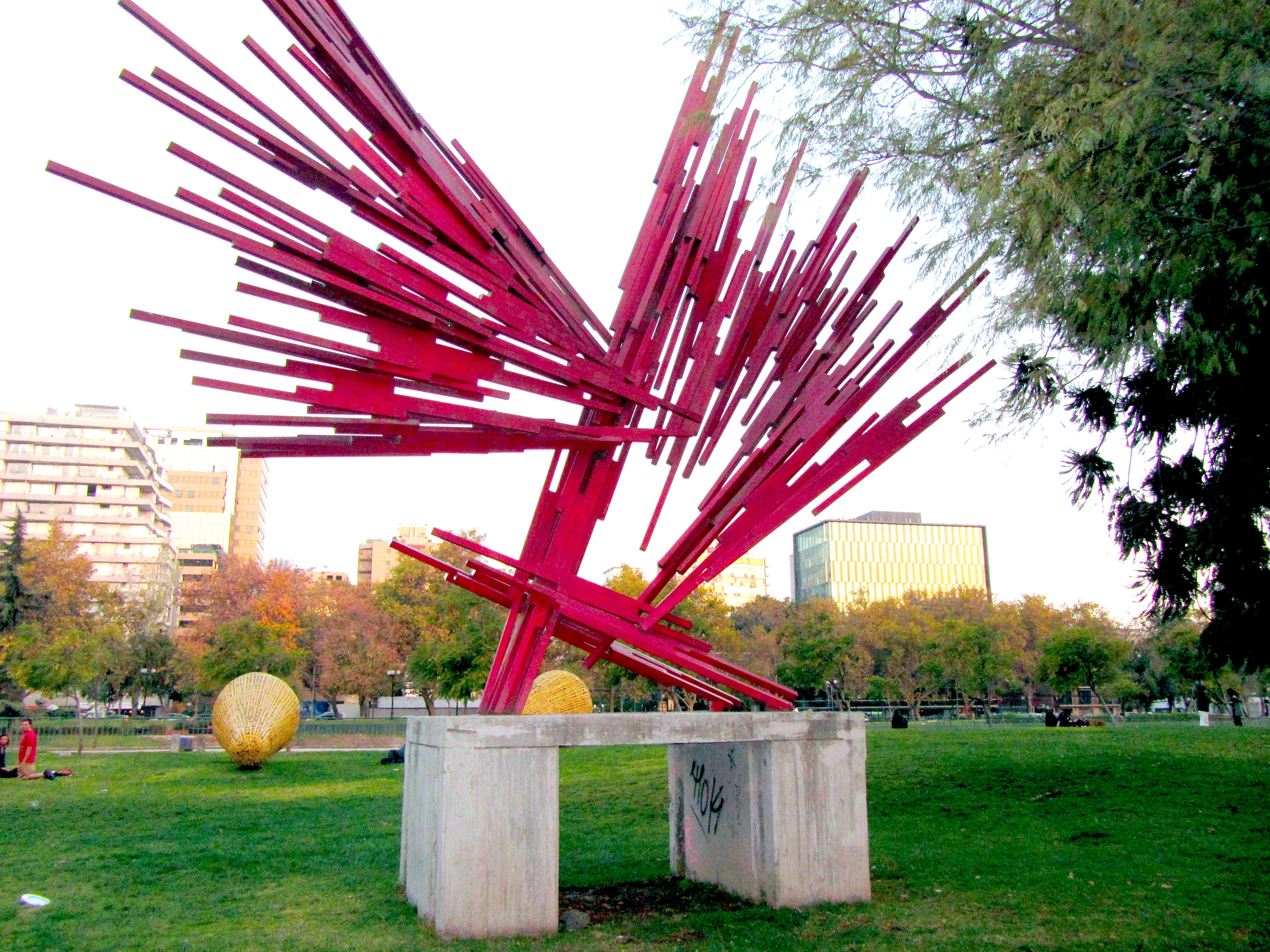 Erupción, de Sergio Castillo. Museo Parque de las Esculturas de Providencia, Santiago de Chile